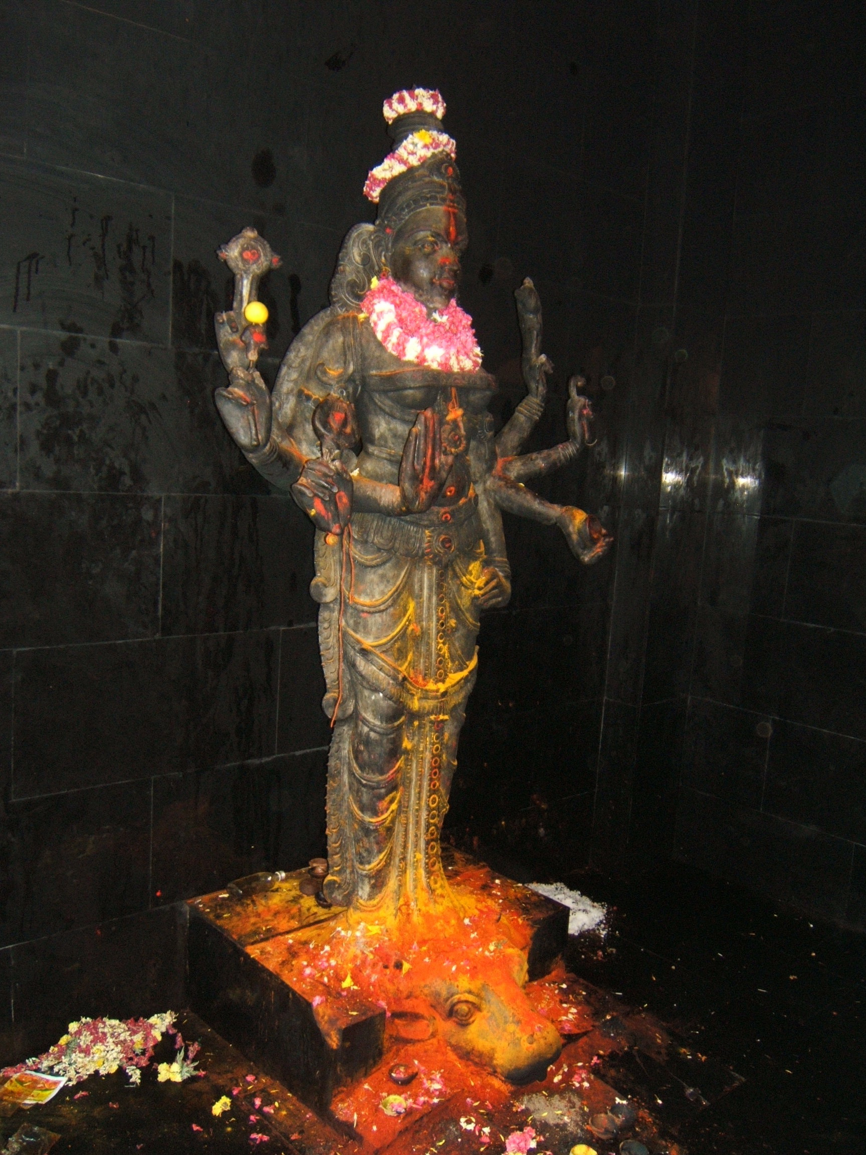 Durga Deity in Tiruvannamalai (Tamil Nadu)